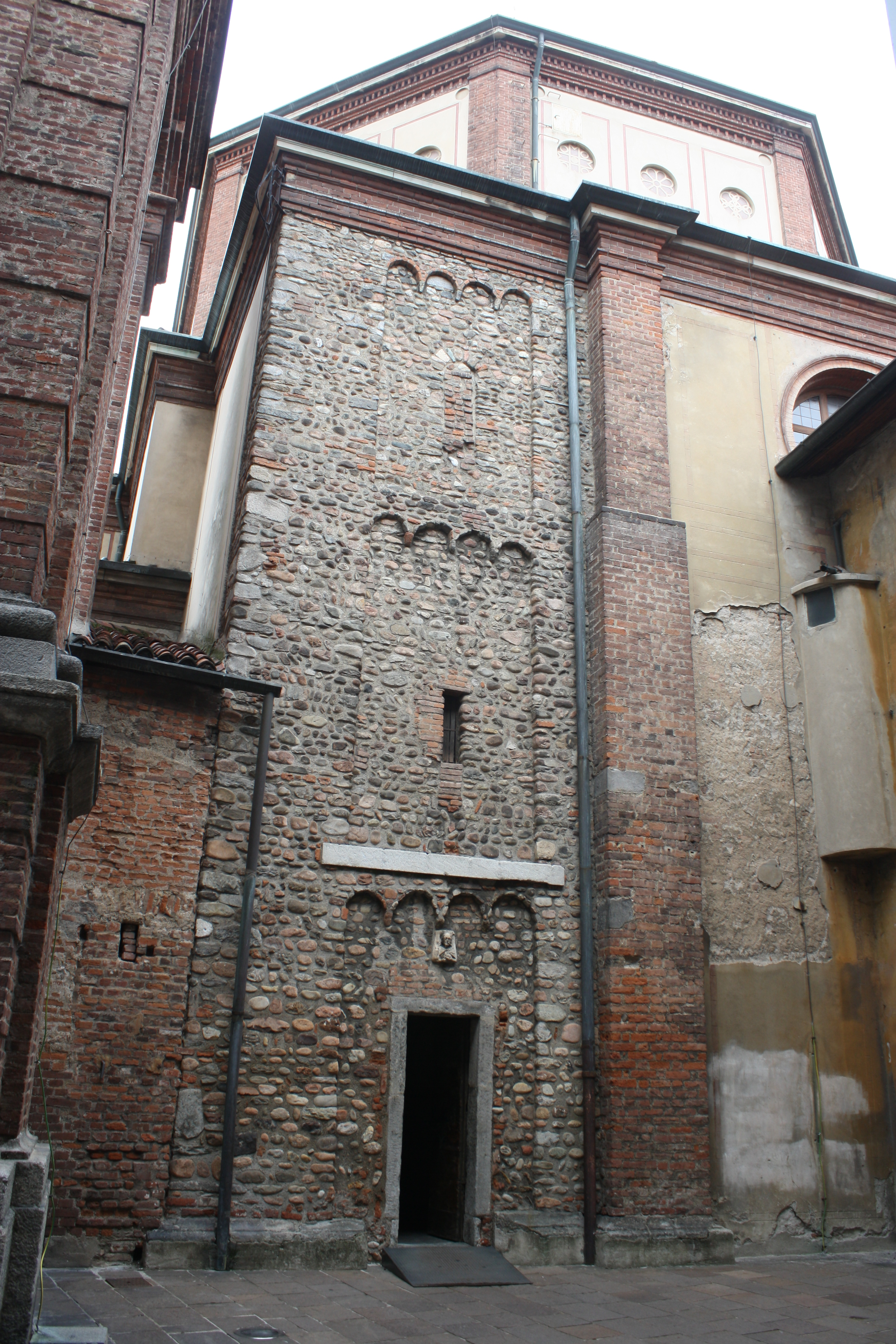 Resti del campanile della chiesa di San Salvatore, oggi appartenente alla basilica di San Magno di Legnano.